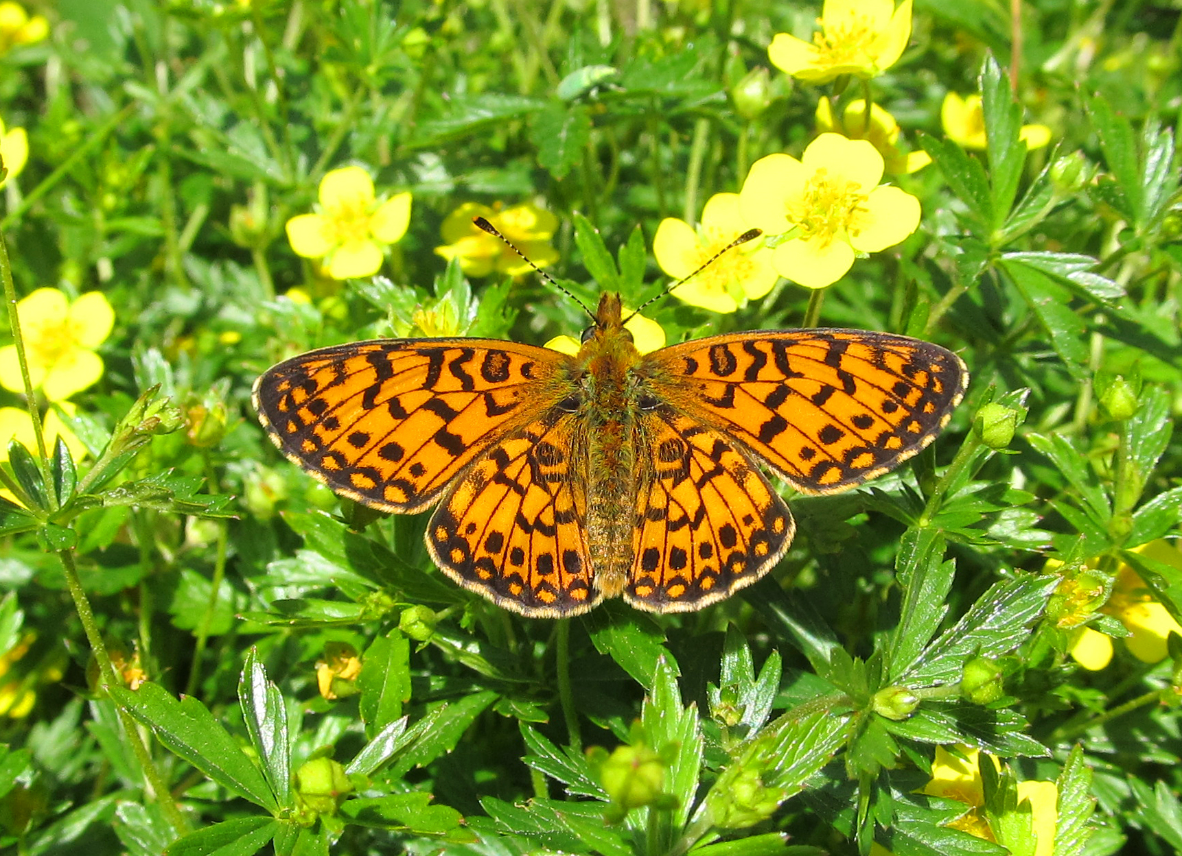 Boloria selene Перламутровка Селена под Санкт Петербургом Small Pearl-bordered Fritillary